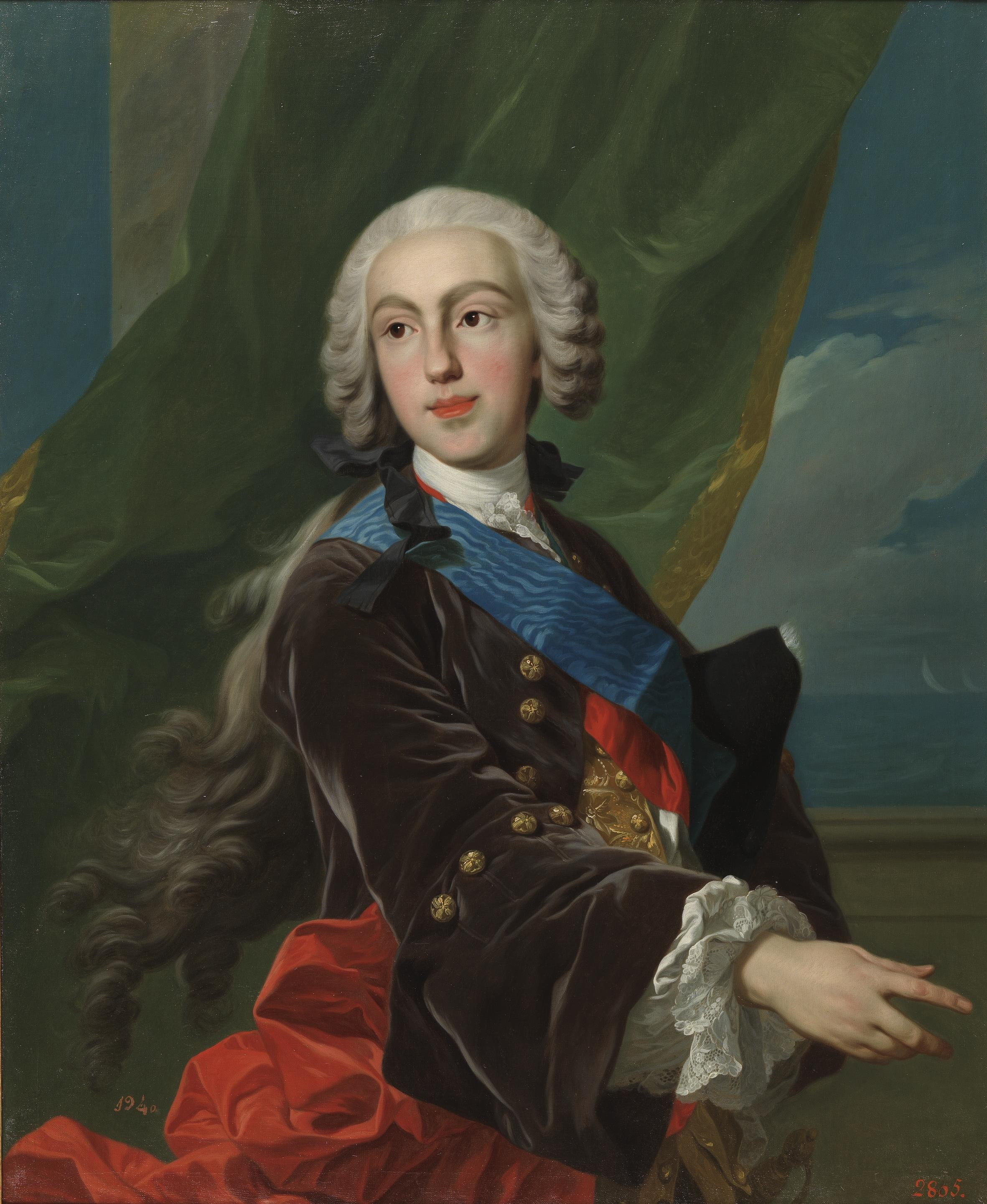 Retrato de Felipe de Borbón y Farnesio (1720-1765), hijo del rey Felipe V de España y de la reina Isabel de Farnesio. Fue infante de España y duque de Parma, de Plasencia y de Guastalla y el fundador de la rama de la Casa de Borbón-Parma.